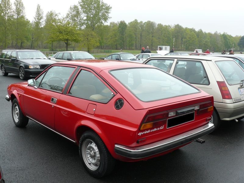 Français cadien: Montlhery Avril 2012